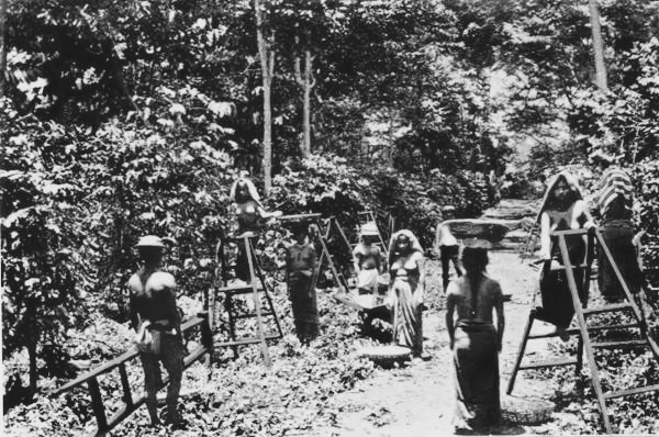 Temporeras indígenas en las plantaciones de café en 1875.